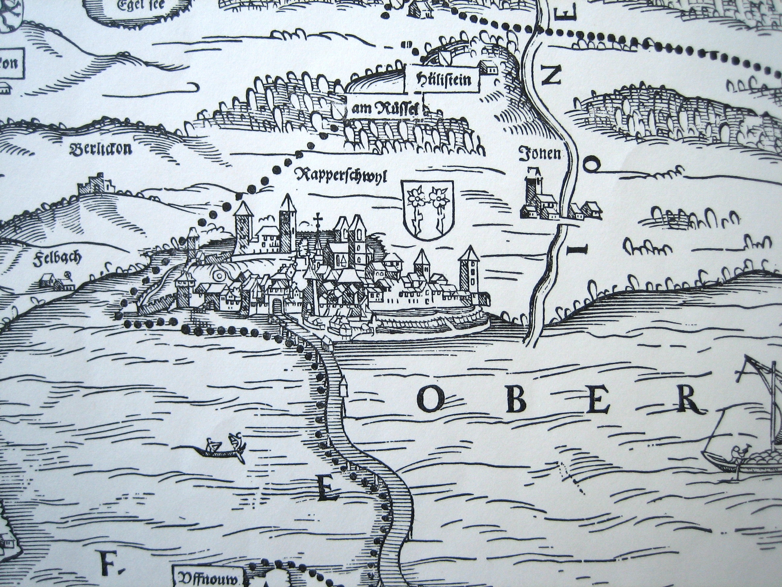 Rapperswil auf dem Murerplan von 1576